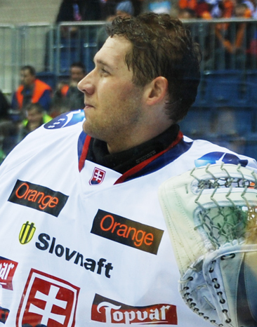 Ján Lašák